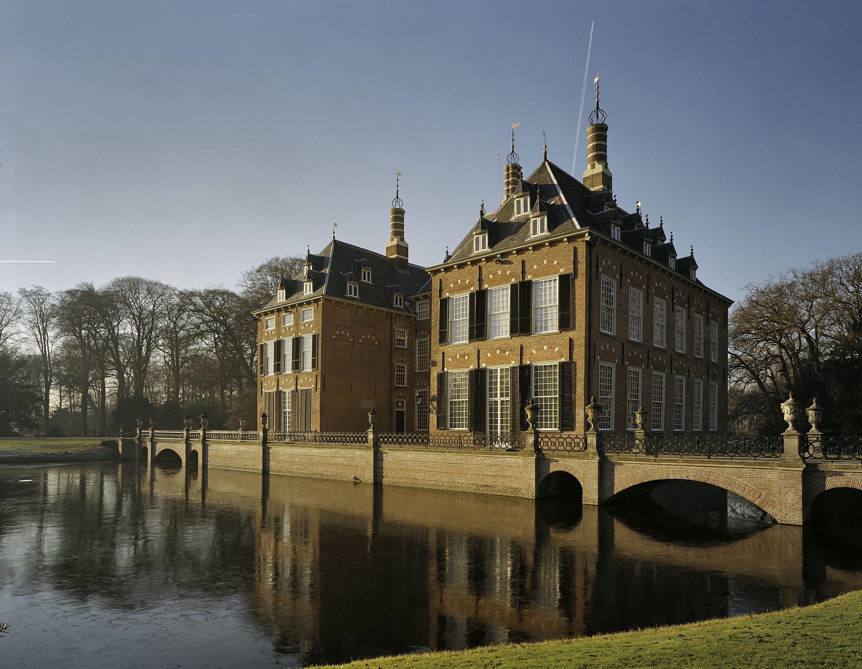 Huis Duivenvoorde: Overzicht voorgevel en rechter zijgevel (opmerking: Gefotografeerd voor Monumenten In Nederland Zuid-Holland)